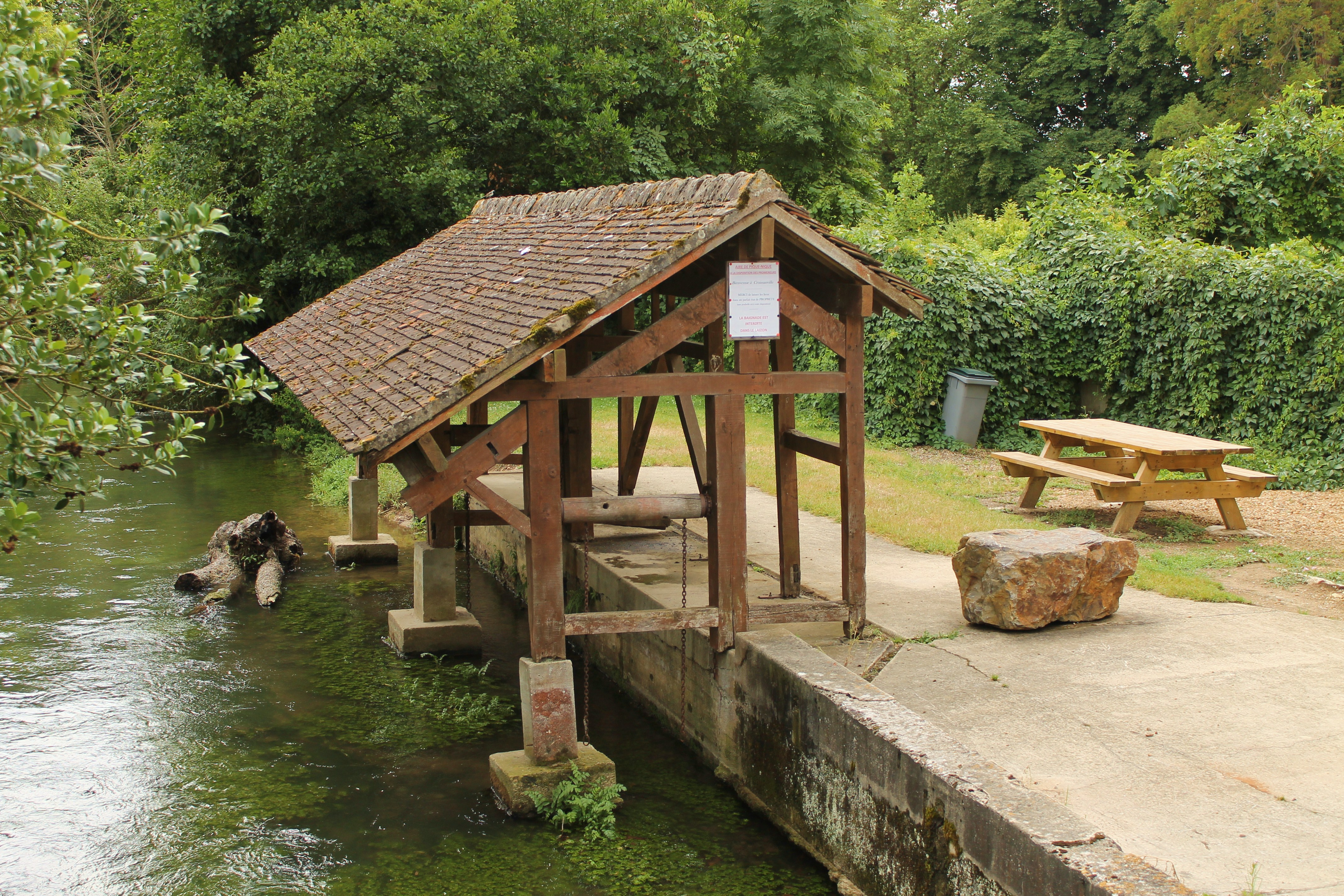 Lavoir sur le Laizon à Croissanville (Calvados)